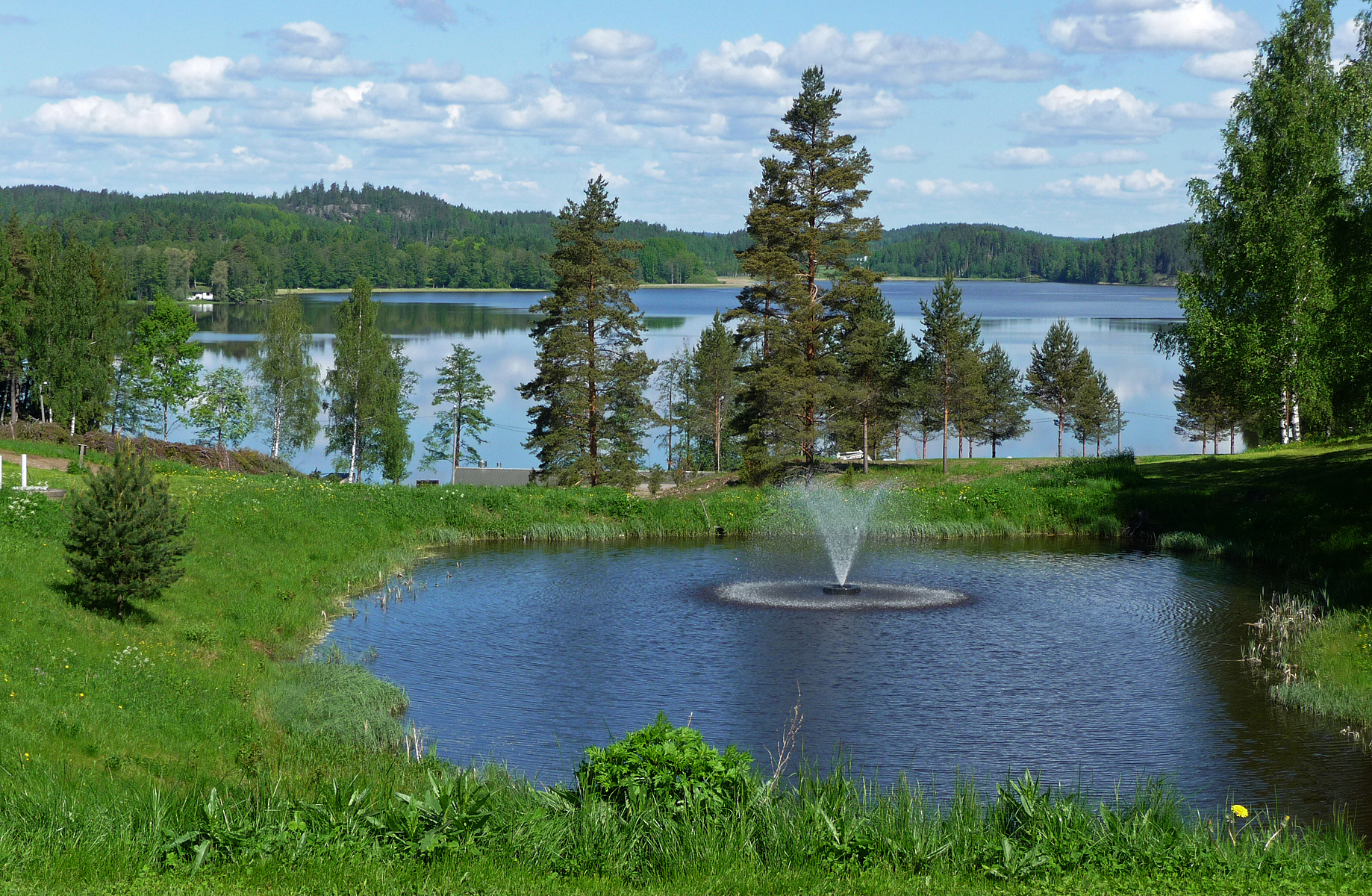 A View from Kisakallio to Maikkala Bay.